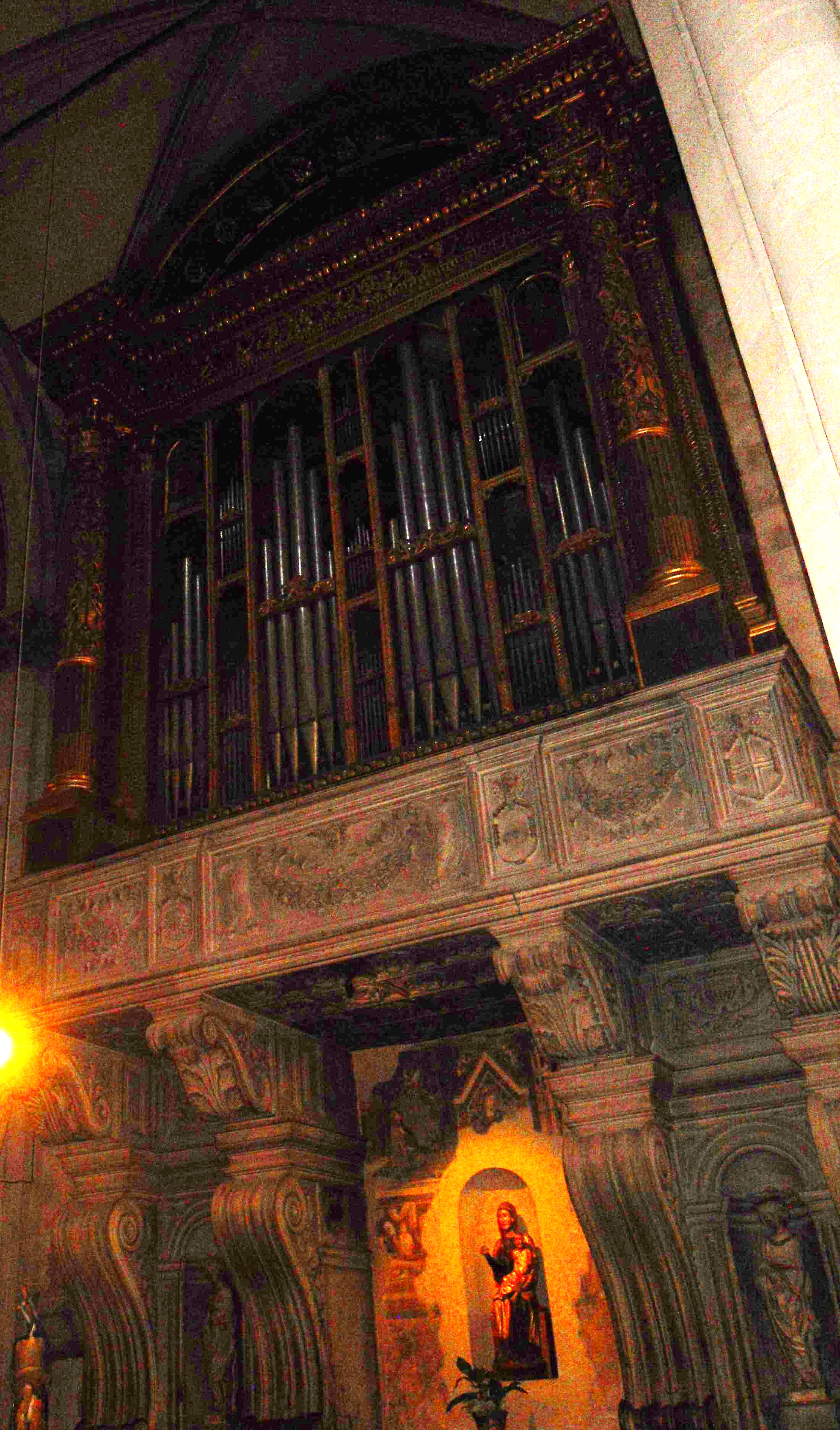 L'organo antico, costruito da Luca di Bernardino da Cortona tra il 1534 e il 1563, del duomo di Arezzo.